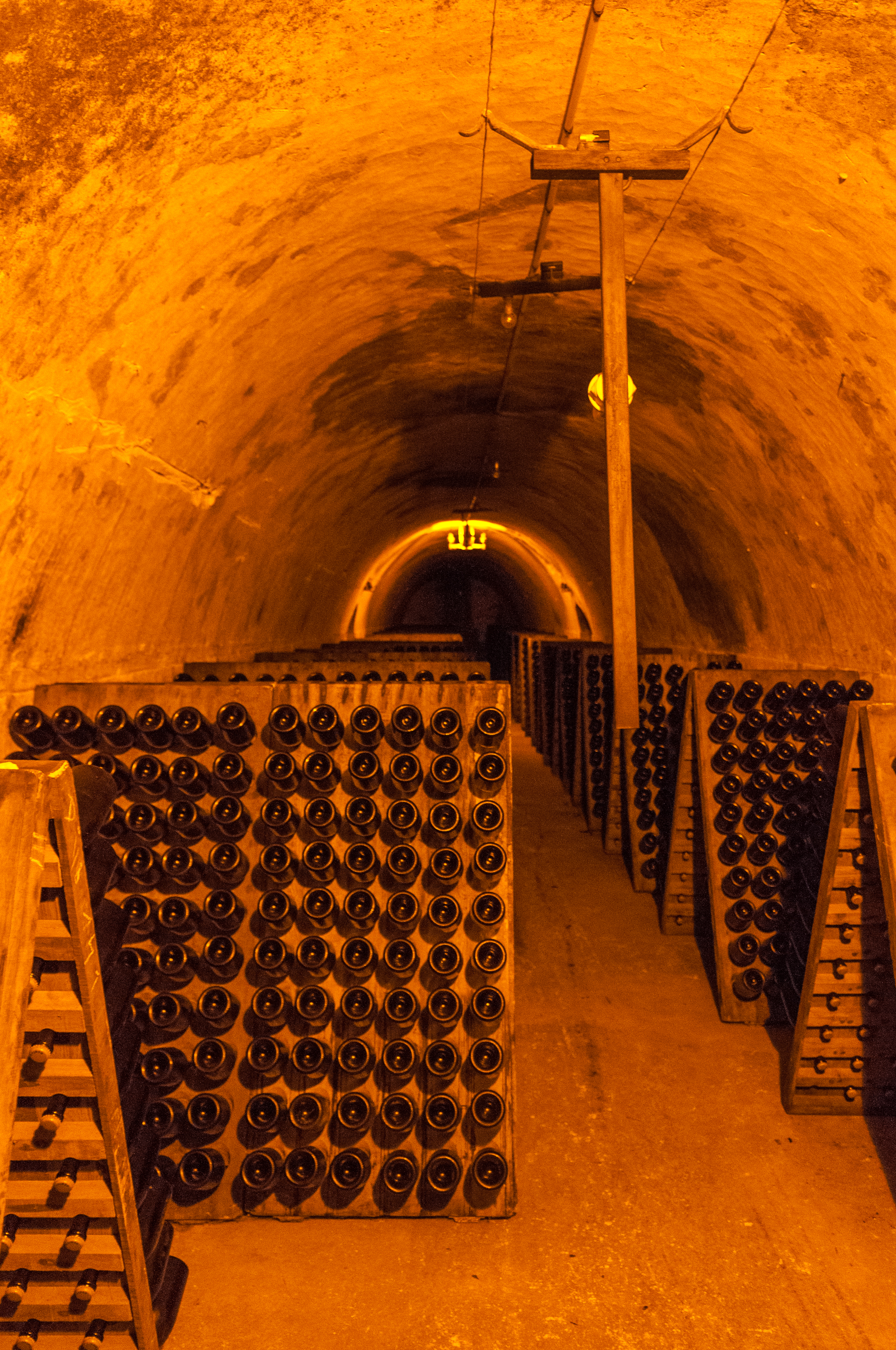 G. H. Mumm